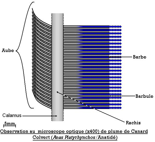 schéma de plume